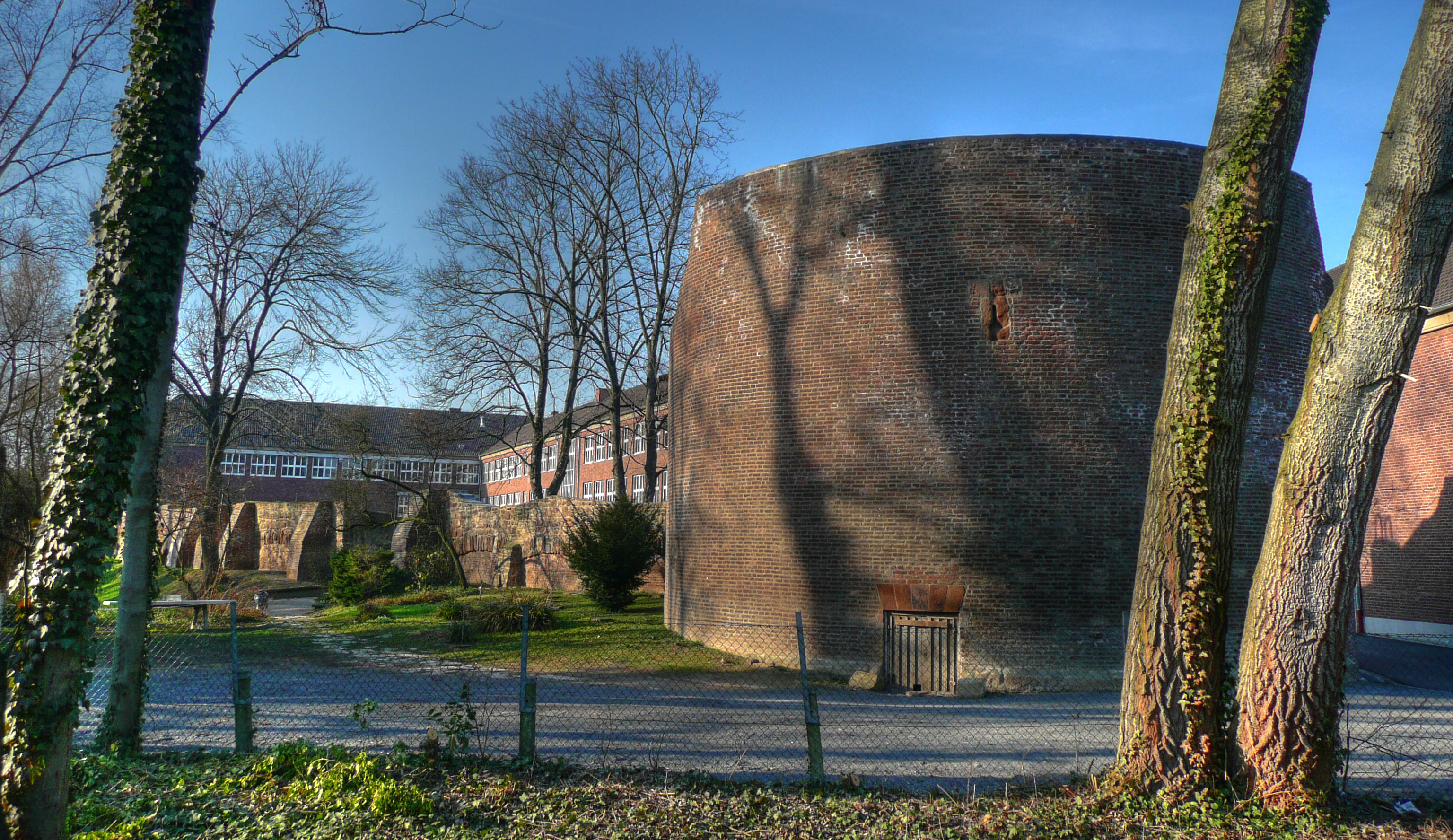 Sogenannter „Dicker Turm“ und Reste der Stadtmauer, dahinter Gebäude des Stiftischen Gymnasiums